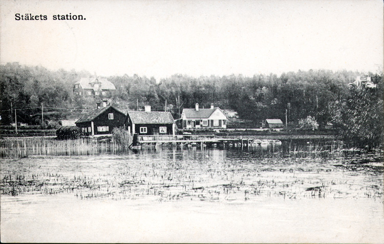 Stäketsundet i Järfälla kommun och Upplands-Bro kommun. Gränsen mellan kommunerna går mitt i sundet. Utmed sundet ligger Stäkets värdshus och krog. Till höger om krogen ligger Stäkets järnvägsstation. Bakom värdshuset ligger villa Pardala (byggdes 1906).